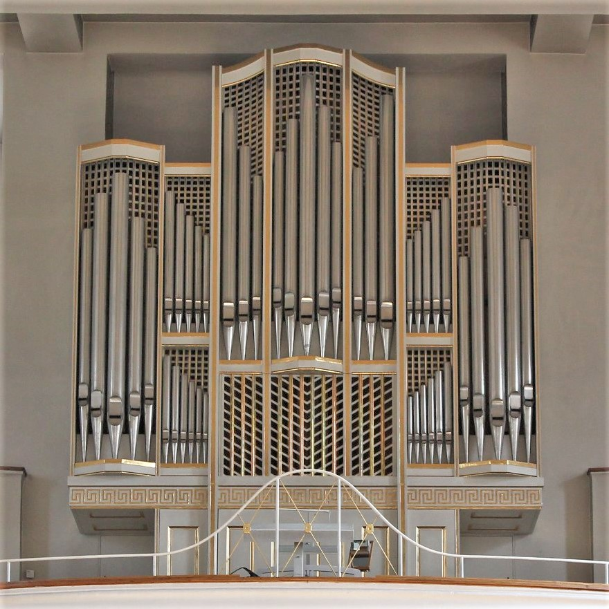 Orgel von St. Korbinian in München (W. Stöberl, II/25)